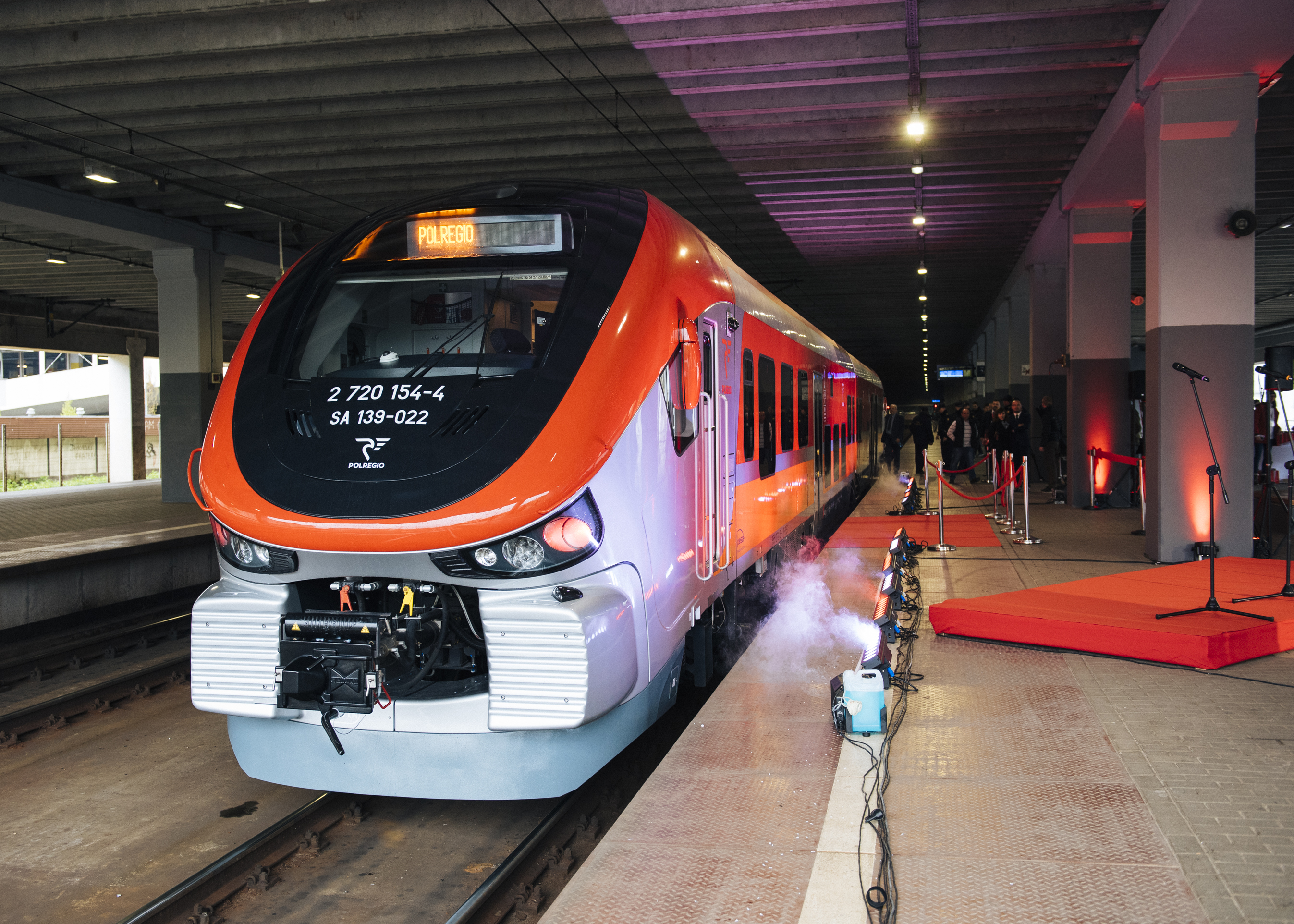 Nowy pociąg PESA Link w barwach POLREGIO należący do spółki